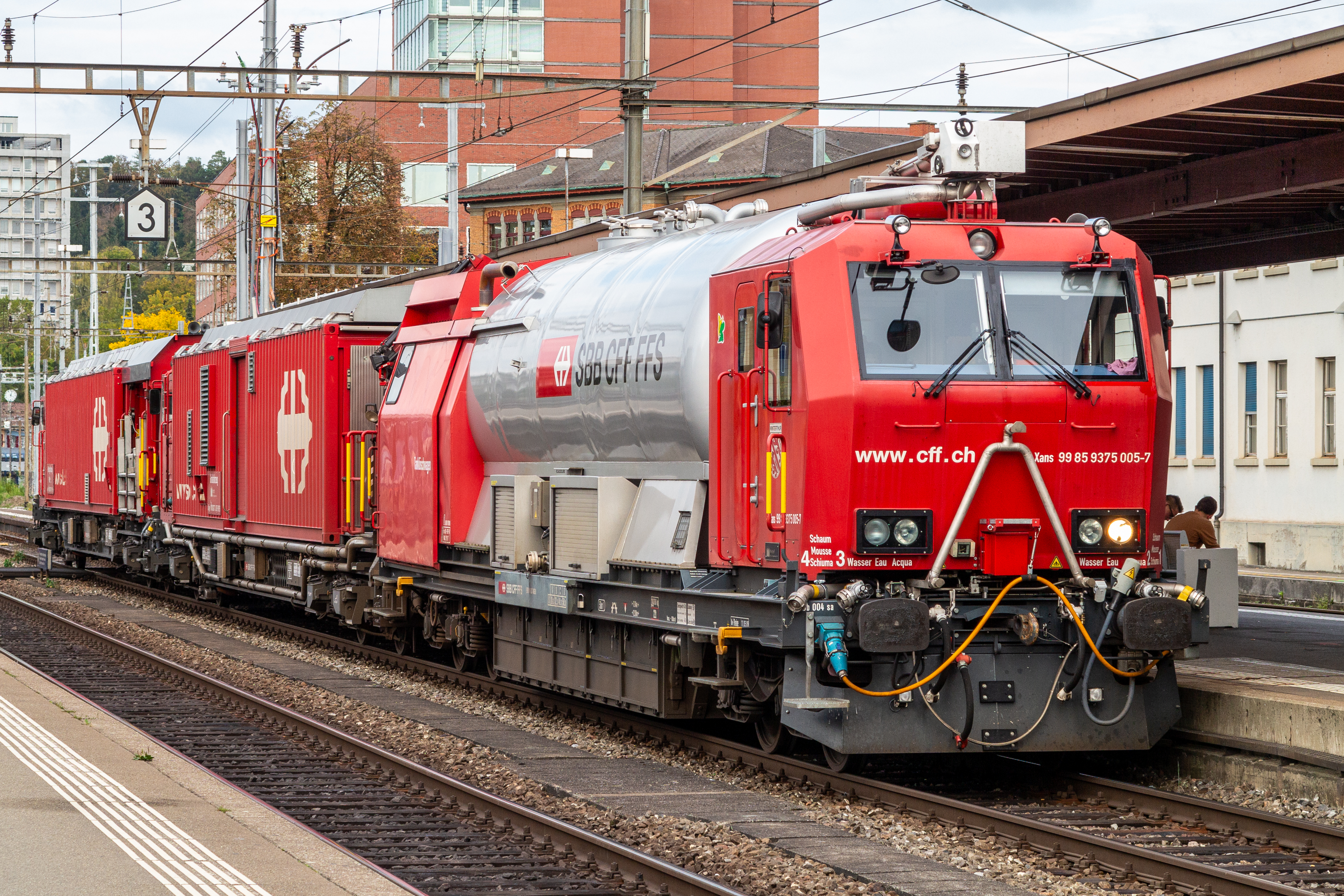 SBB CFF FFS XTmas 99 85 9375 005-7, Train d'Extinction et de Sauvetage 2004 (TES-04) basé à Winterthur